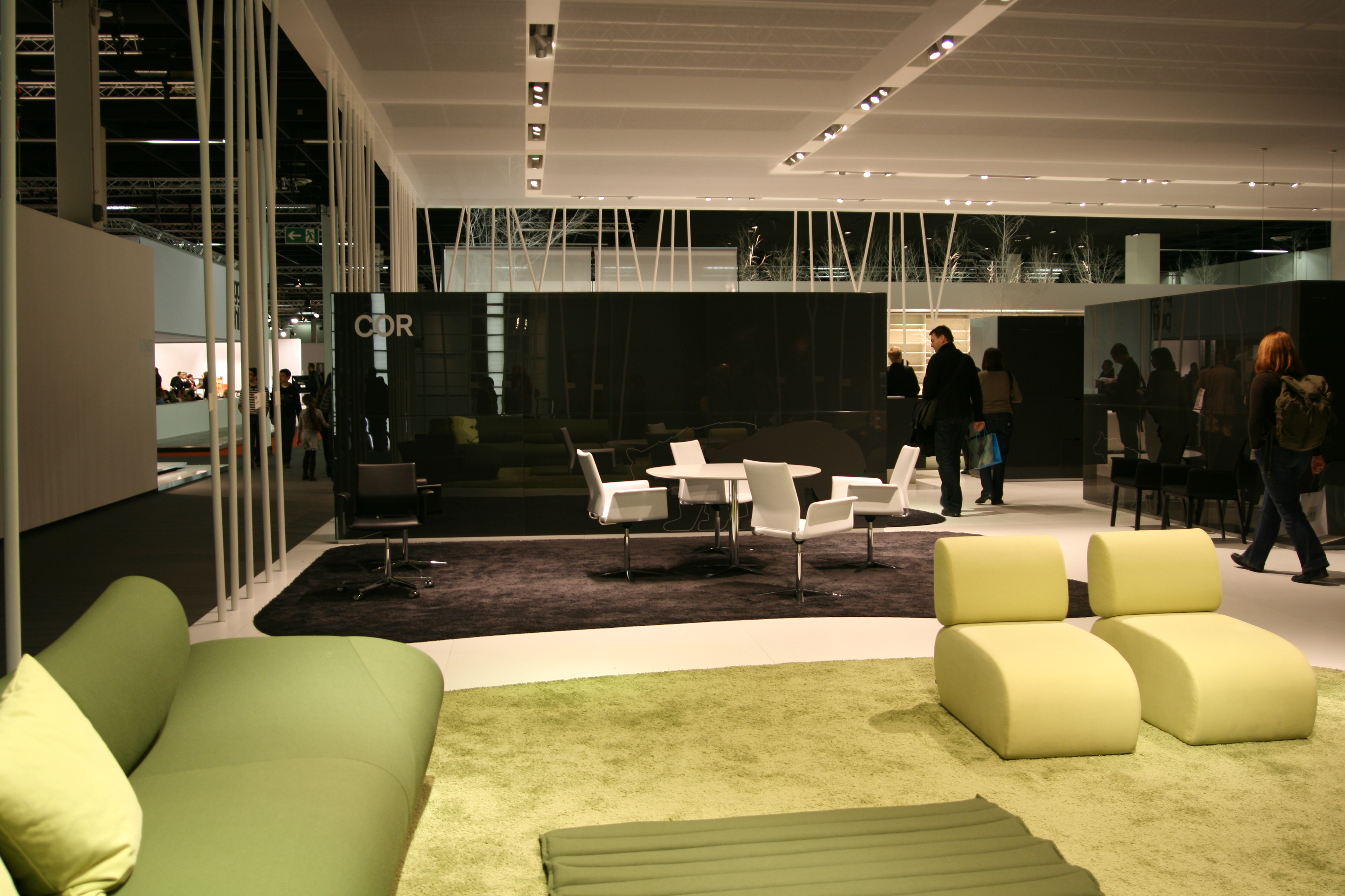 imm Cologne, Köln, Germany